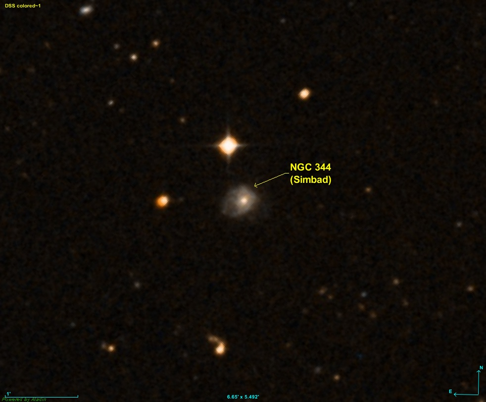 Image créée à l'aide du logiciel Aladin Sky Atlas du Centre de Données astronomiques de Strasbourg et des données de DSS (Digitized Sky Survey).